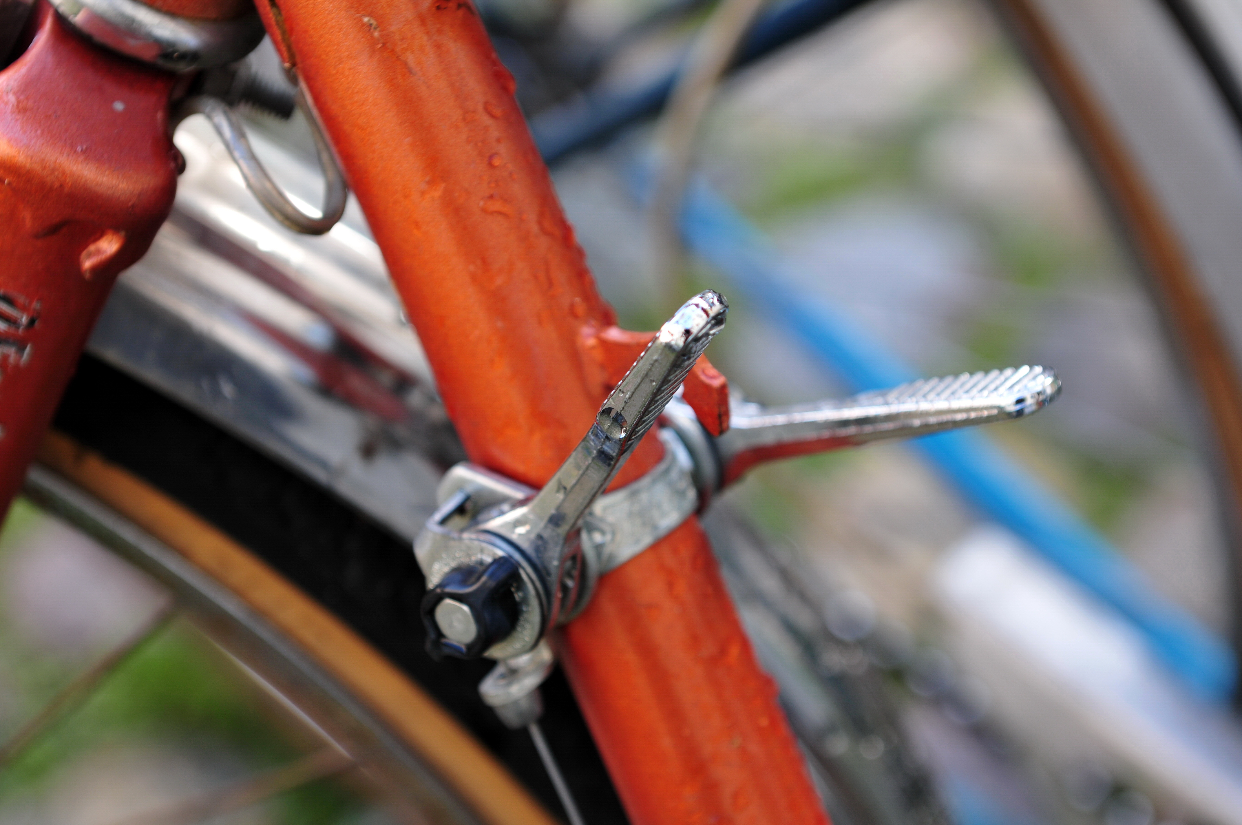 Faire du vélo à Strasbourg